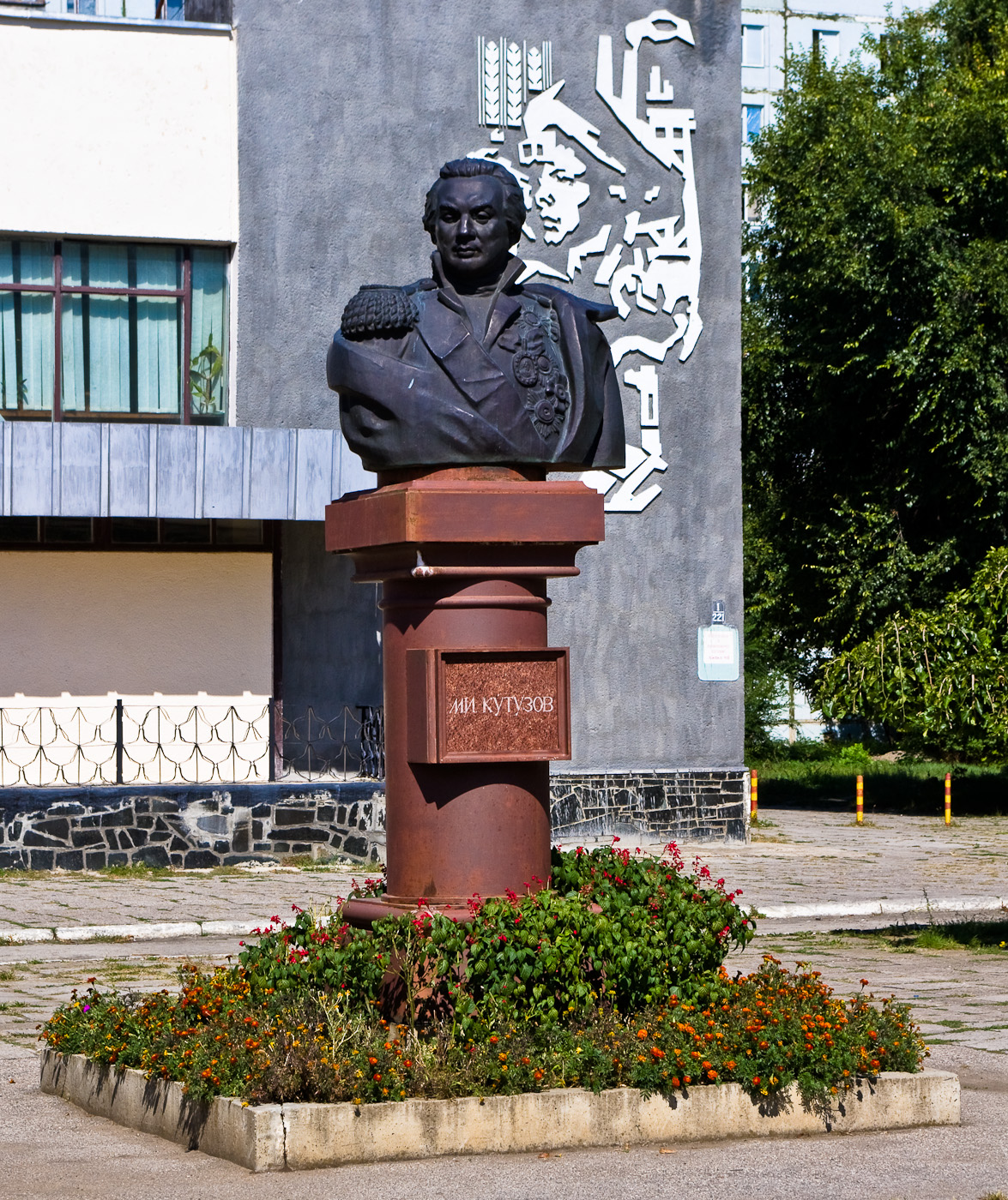 Памятник находится по ул. Карла Либкнехта